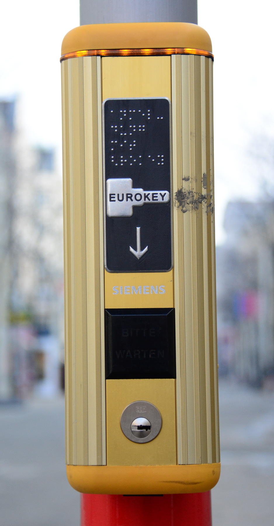 Schalter für Fußgängerampel in der Längenfeldgasse in Wien-Meidling. Fußgängerampel in der Begegnungszone auf der Mariahilfer Straße. Zu betätigen mit Euro Key